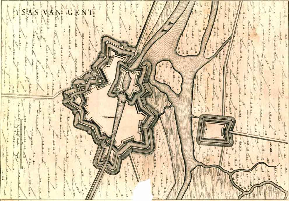 't Sas van Gent